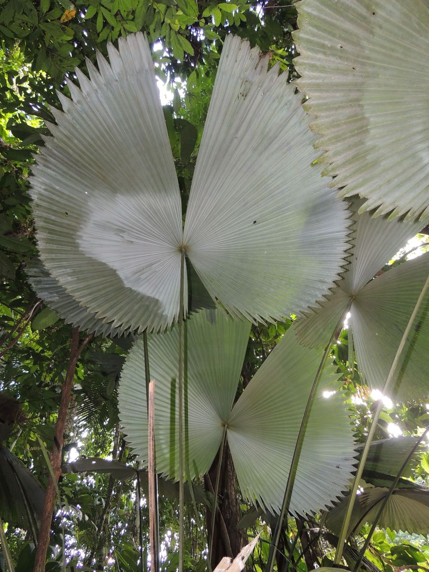 Envés de la hoja